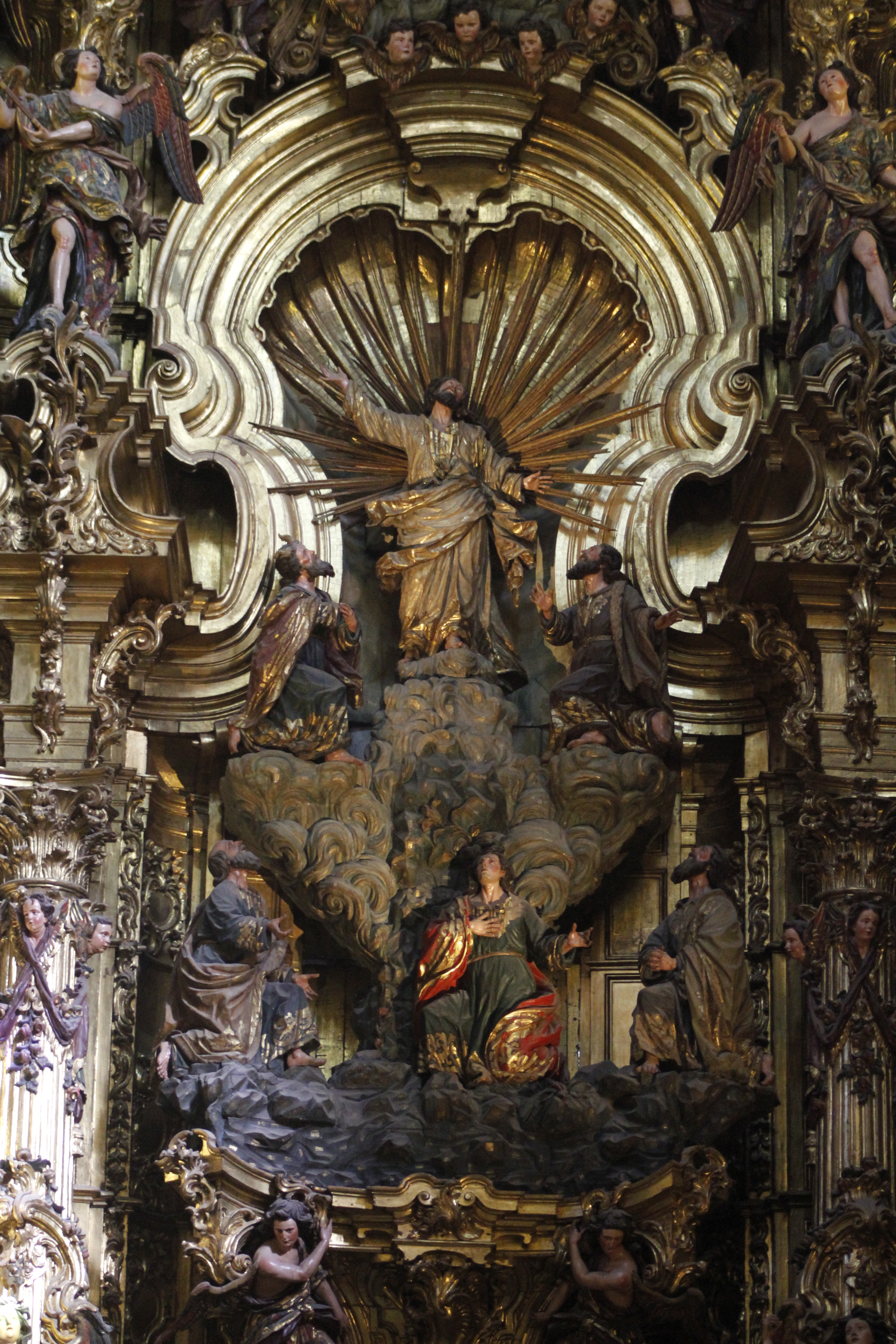 Transfiguração no altar principal